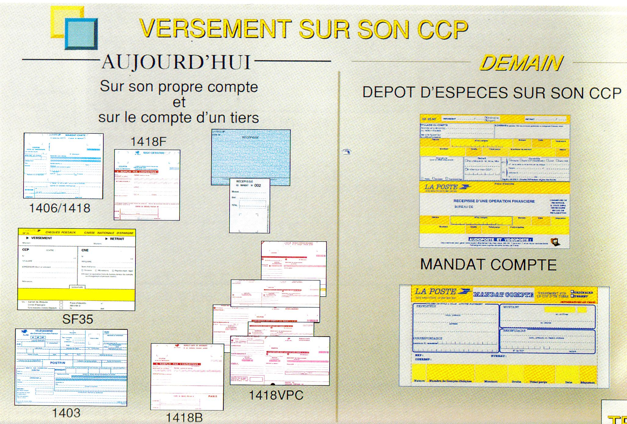 Compare l'ancien système avec le nouveau.